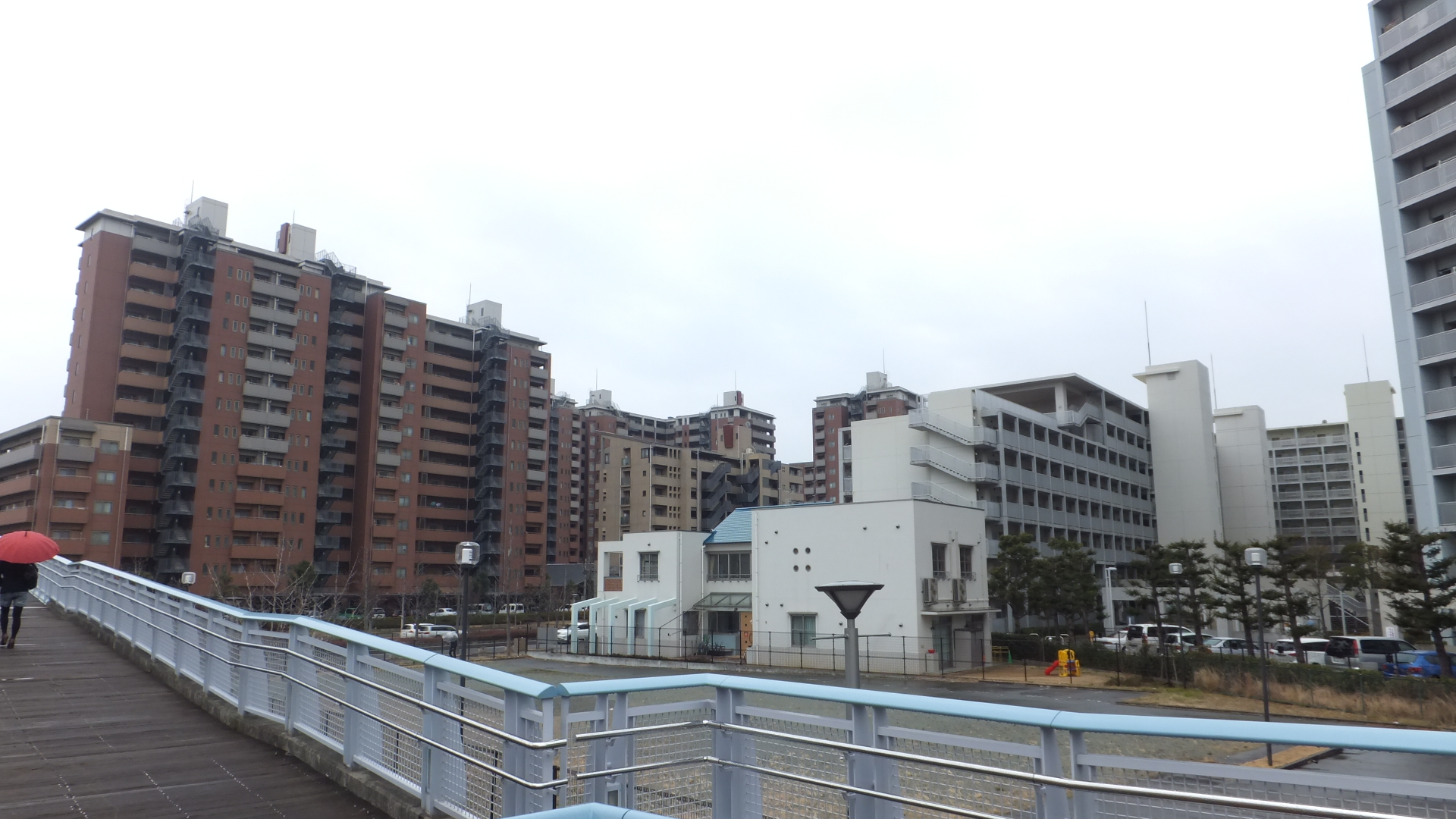 兵庫県神戸市中央区脇浜海岸通3丁目